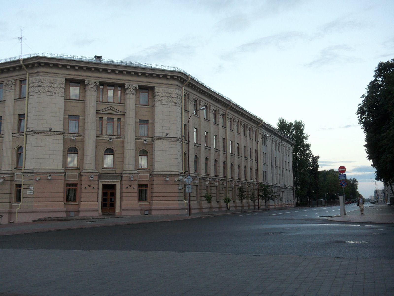 К.Маркса №40